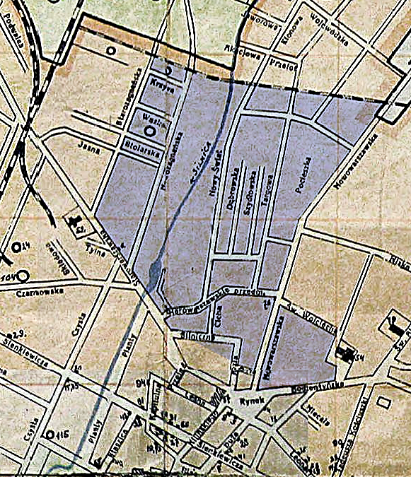 Getto kieleckie na planie miasta z 1930 r. Rynek, Silniczna, Cicha, Targowa, Nowy Świat, Dąbrowska, Bodzentyńska, Orla, Kozia, Pocieszka, Kościół Świętego Wojciecha, Jasna, Stolarska, Krzywa, Starowarszawska (→ Piotrkowska), Warszawska, Okrzei, Zagnańska.